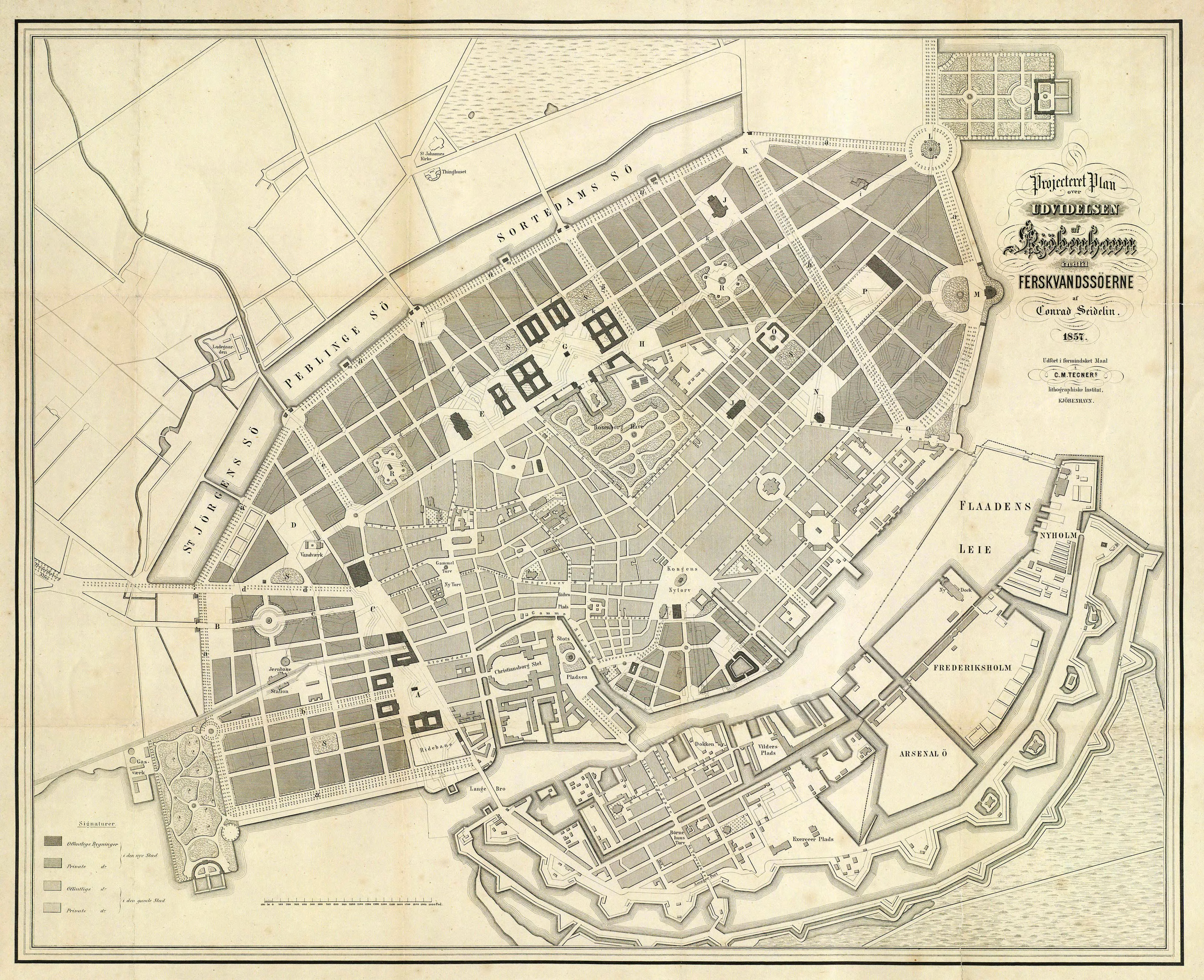 Projecteret Plan over Udvidelsen af Kjöbenhavn indtil Ferskvandssöerne. Kjöbenhavn 1857: Udfört i formindsket maal i C. M. Tegners lithographiske Institut. 52 x 65 cm.